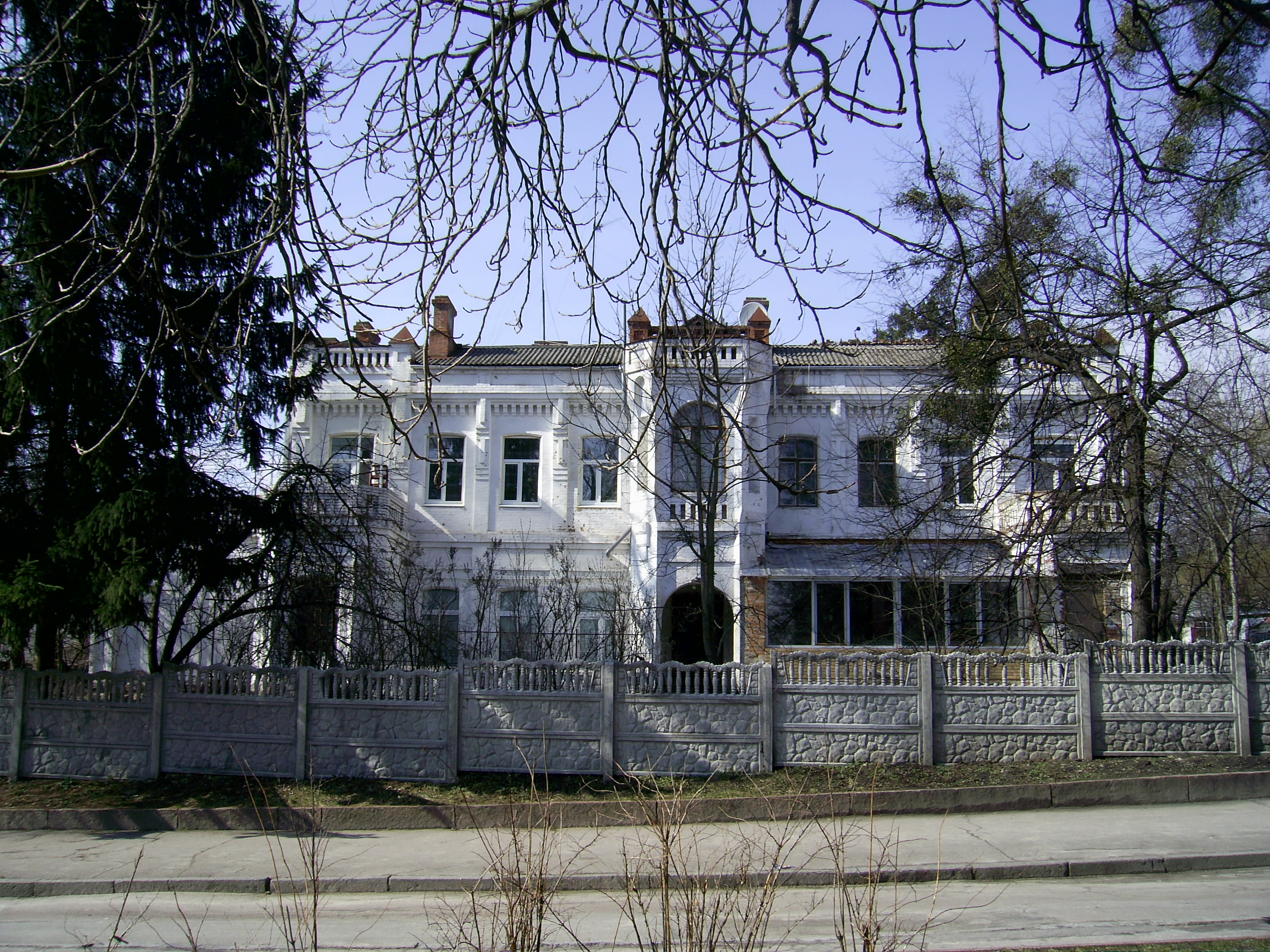 Житомир . Особняк міського голови Доманєвського